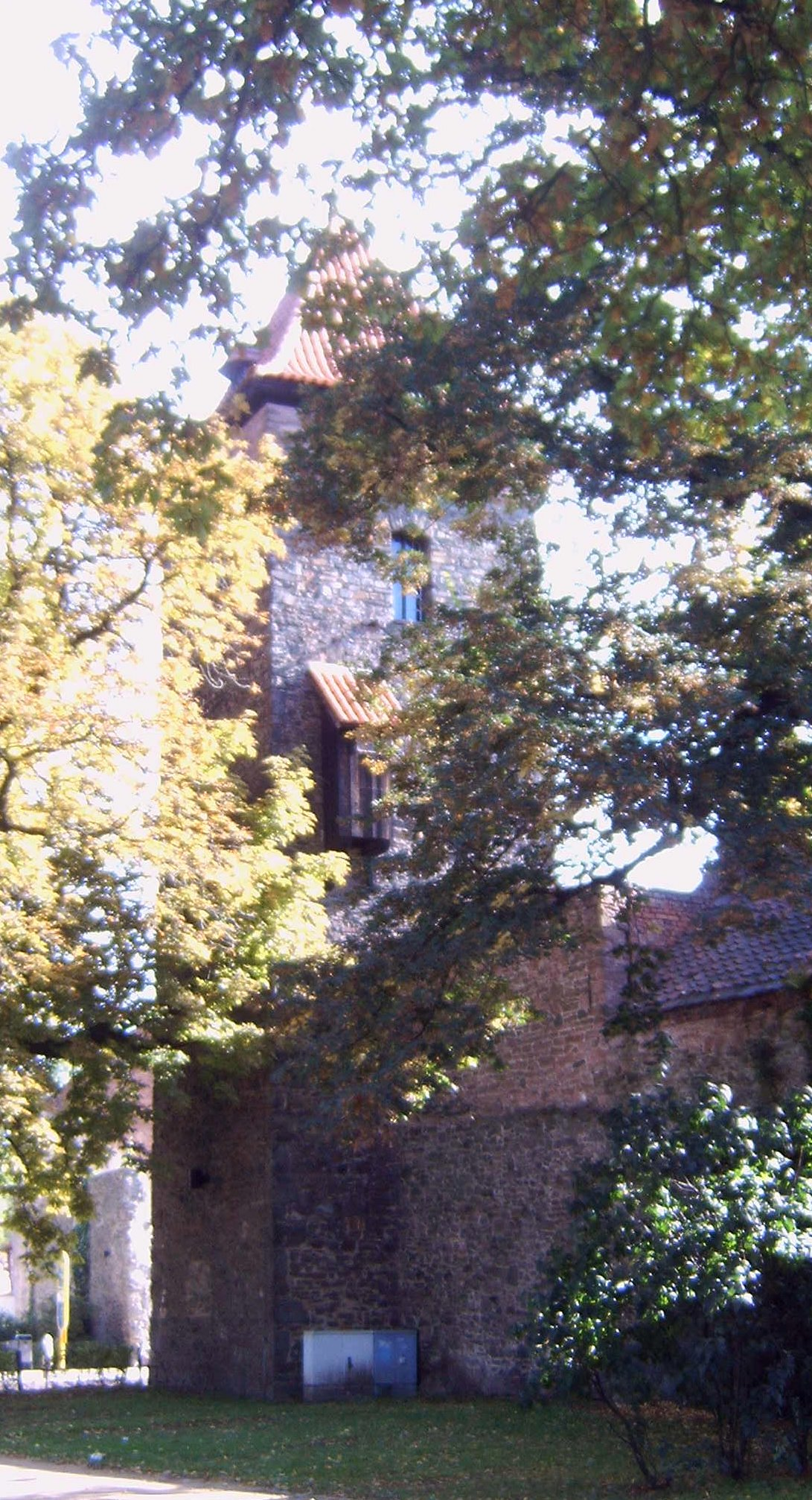 Bülstringer Torturm in Haldensleben, Stadtaußenseite, Sachsen-Anhalt, deutschland